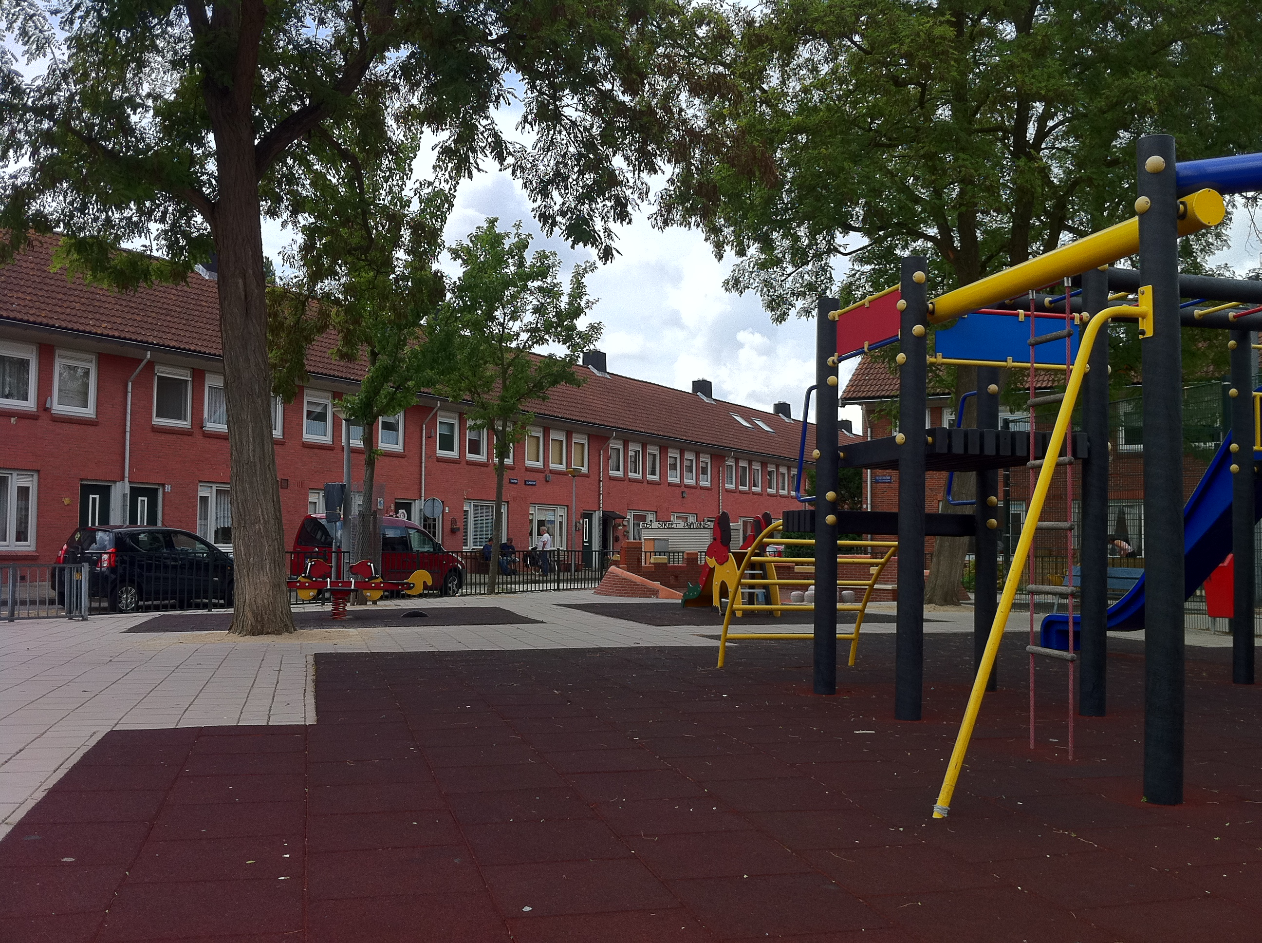 Tuindorp Buiksloot Amsterdam-Noord juli 2011